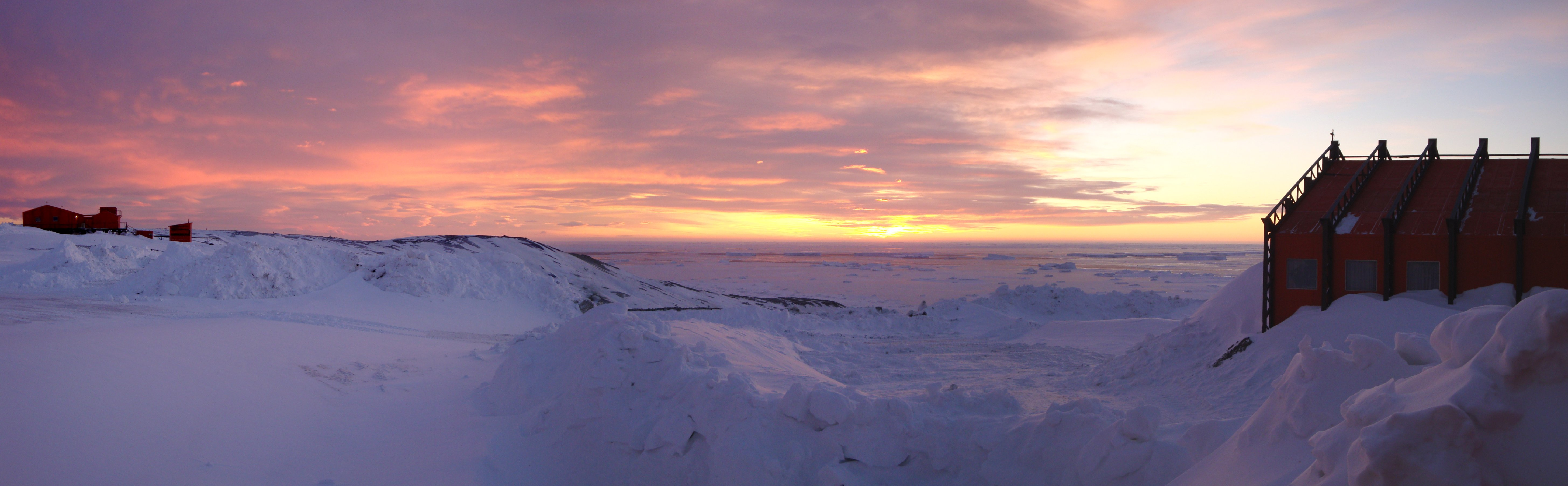 Amanecer en la Base Marambio